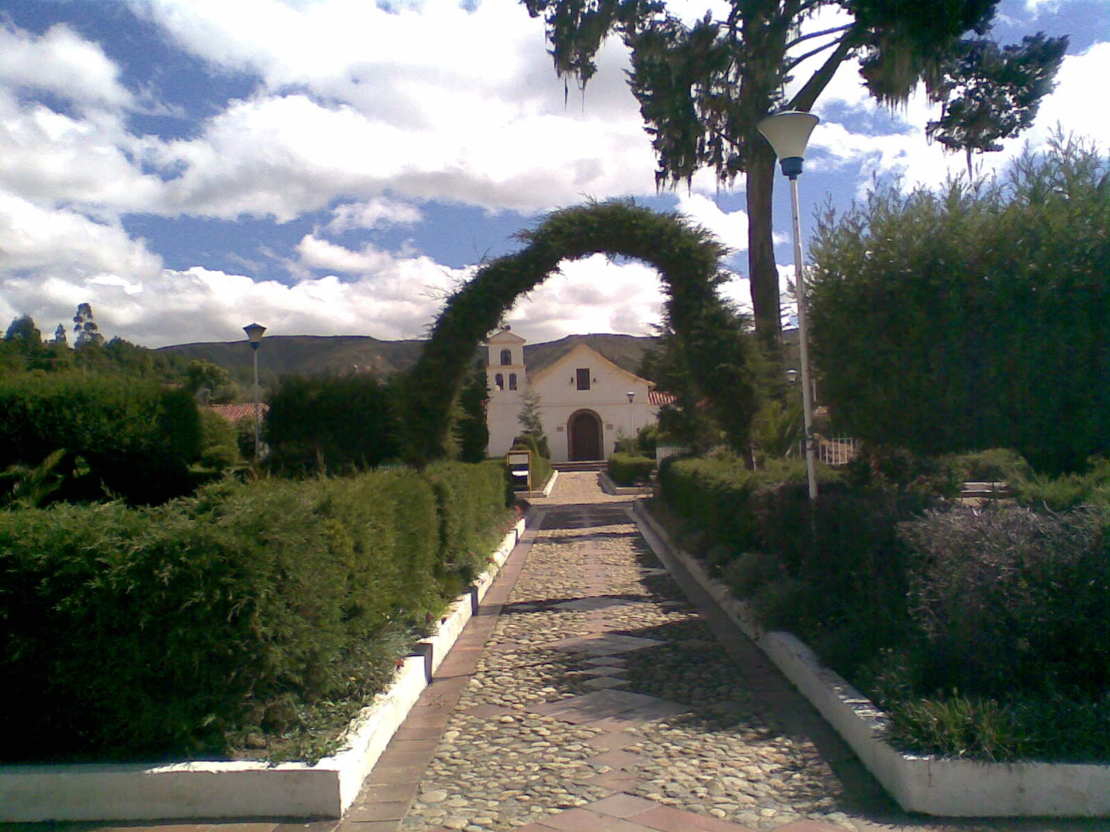 Vista parcial de la plazoleta de Busbanzá